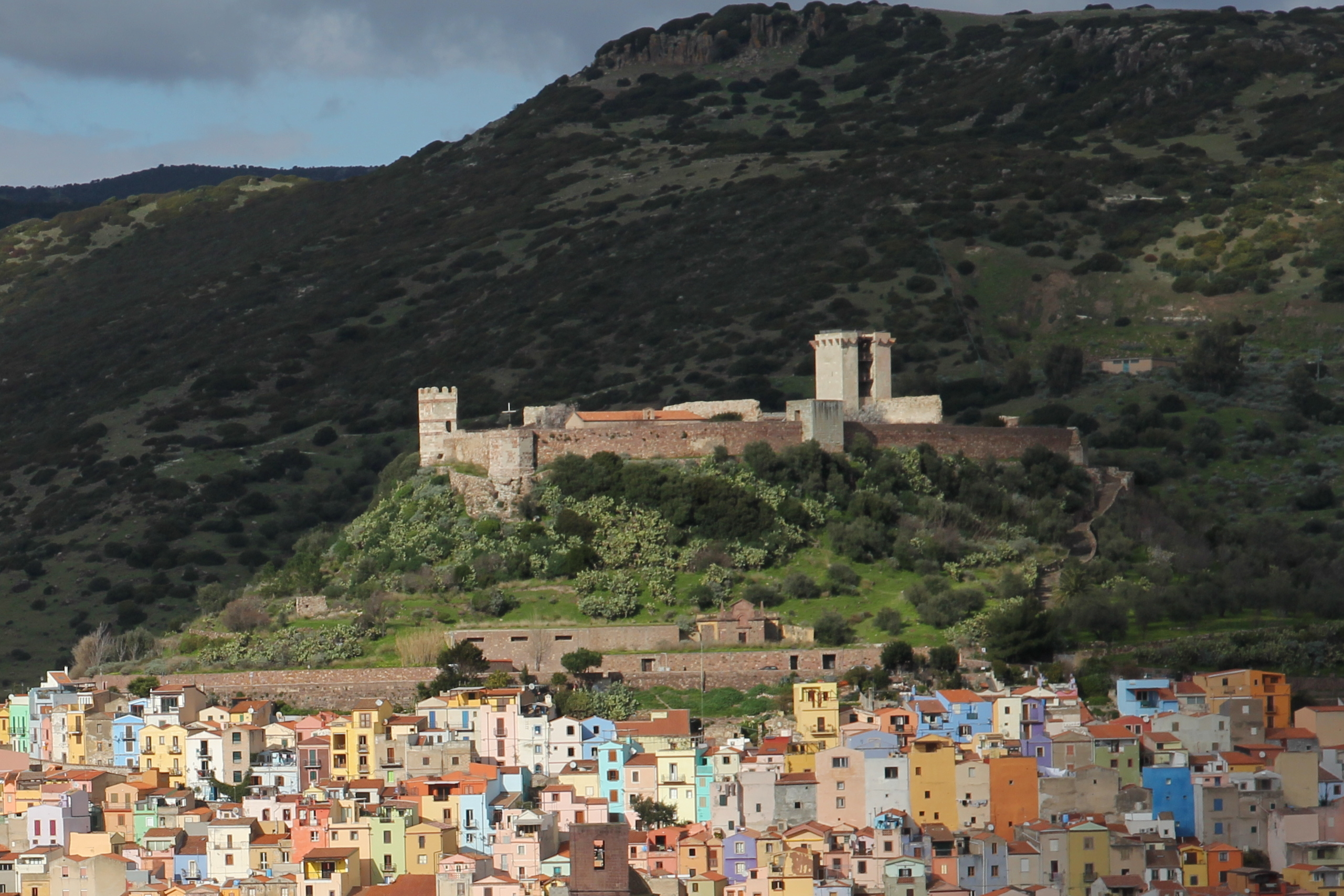 Bosa - Panorama